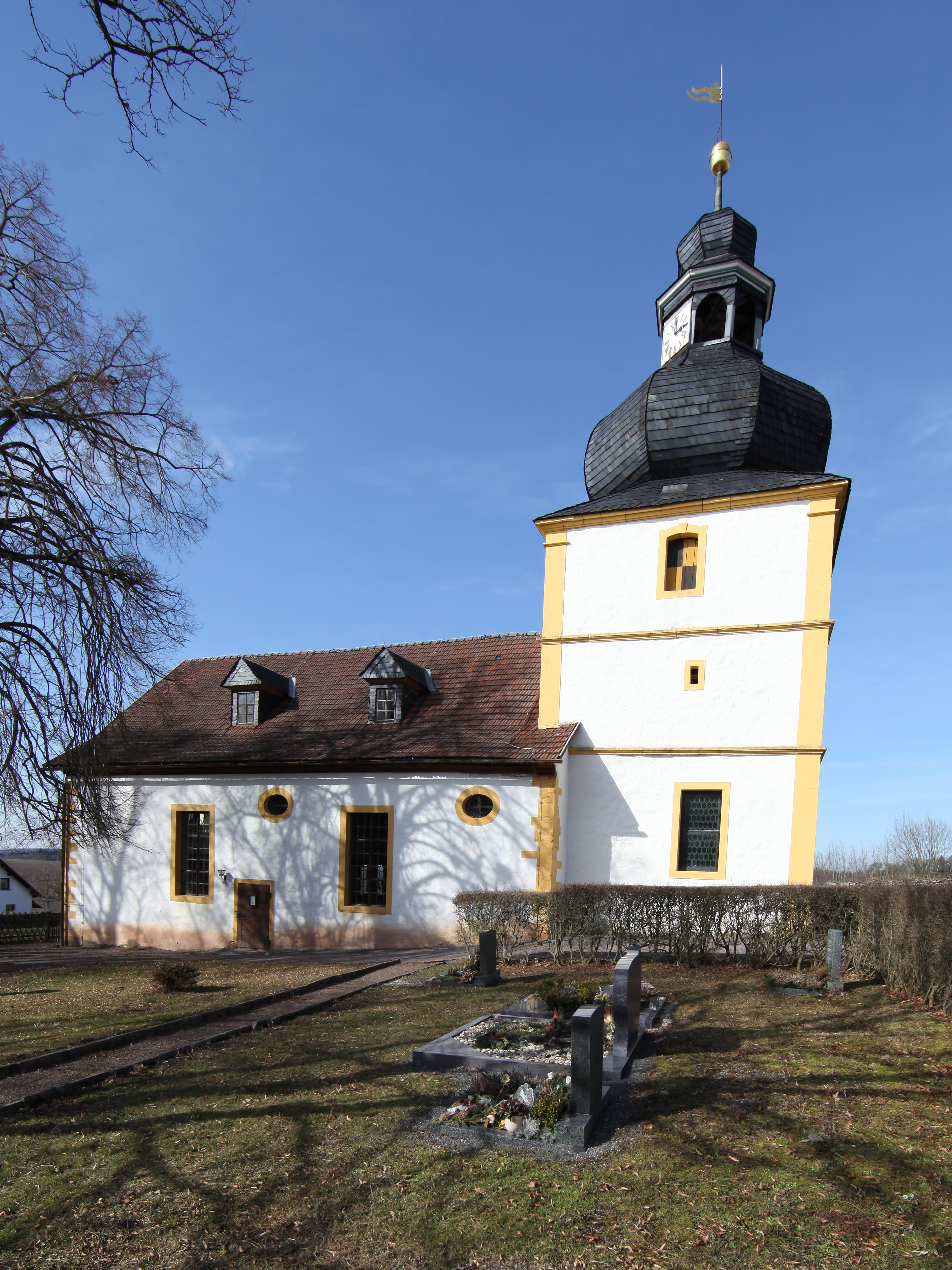 Evangelisch-lutherisch Kirche St. Nikolas in Pfersdorf, OT von Hildburghausen